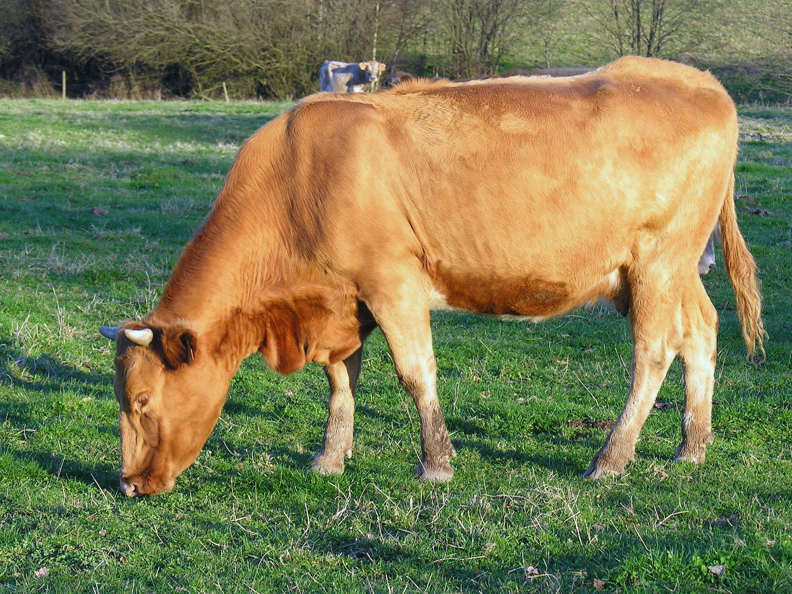 A Castañeda, Concello de Arzúa, Galiza